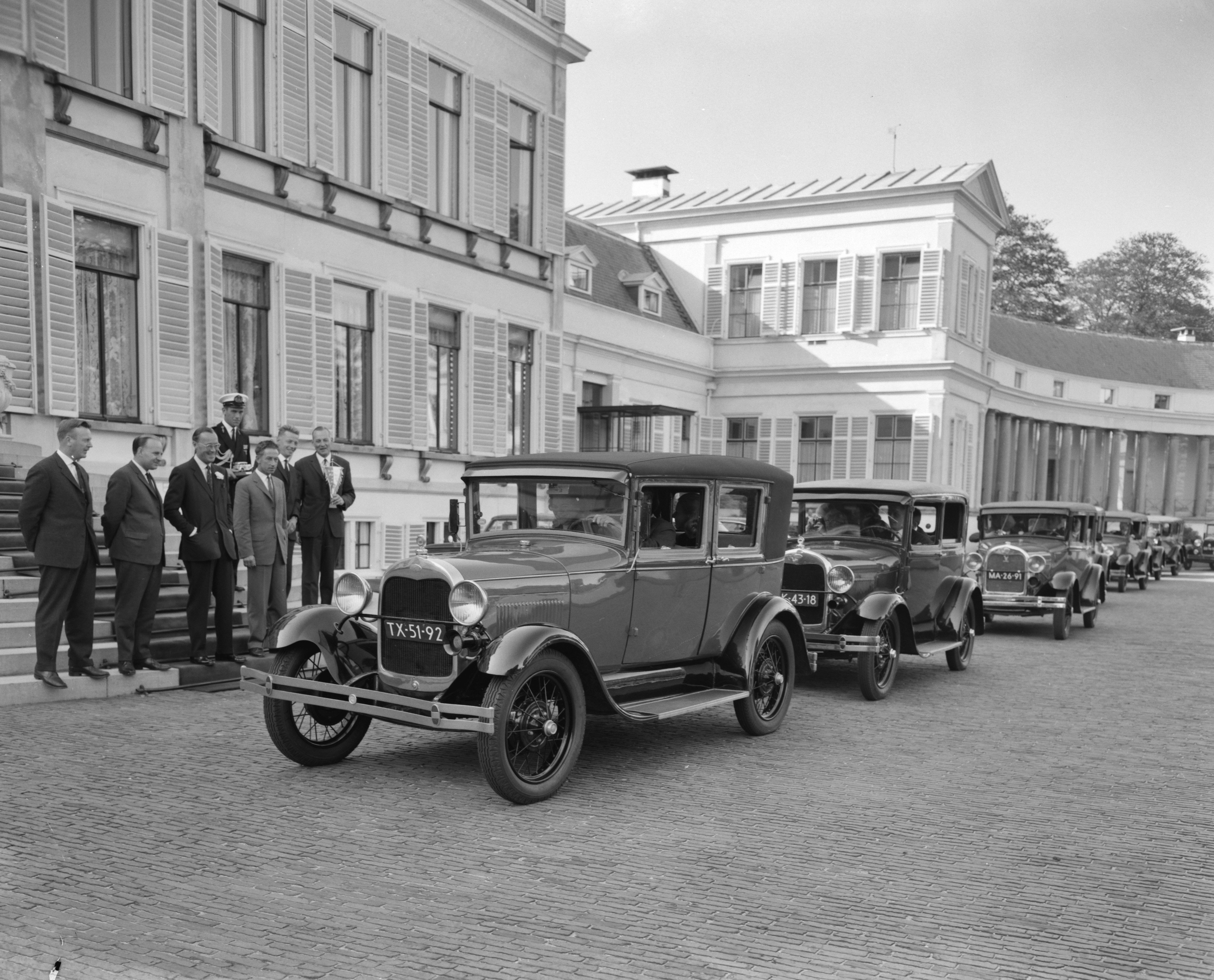 Collectie / Archief : Fotocollectie Anefo Reportage / Serie : [ onbekend ] Beschrijving : De A Ford Club Nederland gedefileerd voor Prins Bernhard op Paleis Soestdijk Datum : 30 september 1964 Trefwoorden : auto's, defiles Persoonsnaam : A Ford Club, Bernhard, prins Fotograaf : Bilsen, Joop van / Anefo Auteursrechthebbende : Nationaal Archief Materiaalsoort : Negatief (zwart/wit) Nummer archiefinventaris : bekijk toegang 2.24.01.04 Bestanddeelnummer : 916-9507